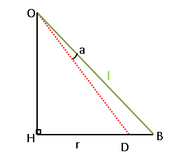 Détail du schéma de l'horizon sur un capteur photographique